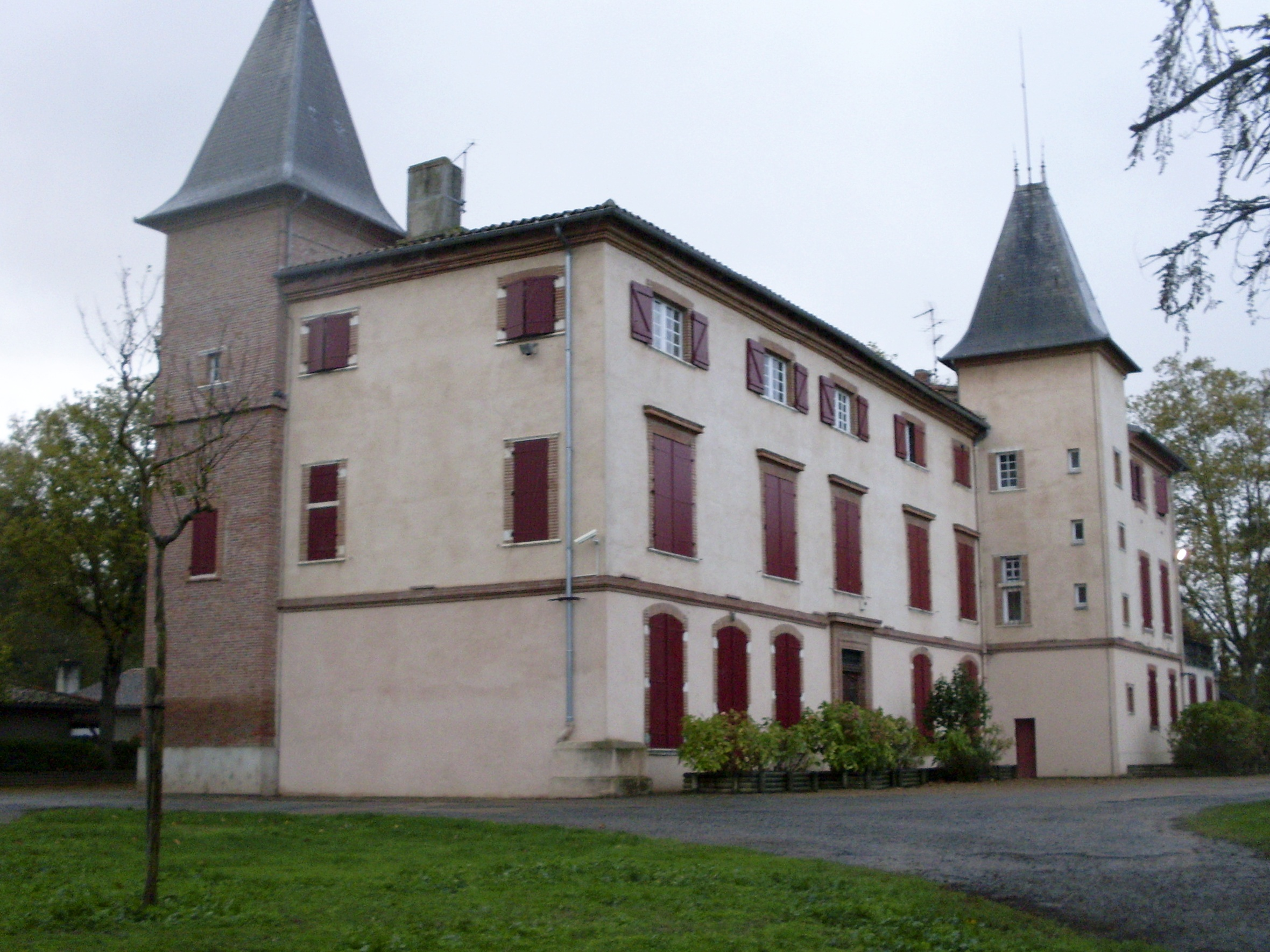 Château du Mirail (Toulouse, Haute-Garonne, France).